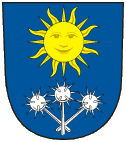 Znak obce Věžky